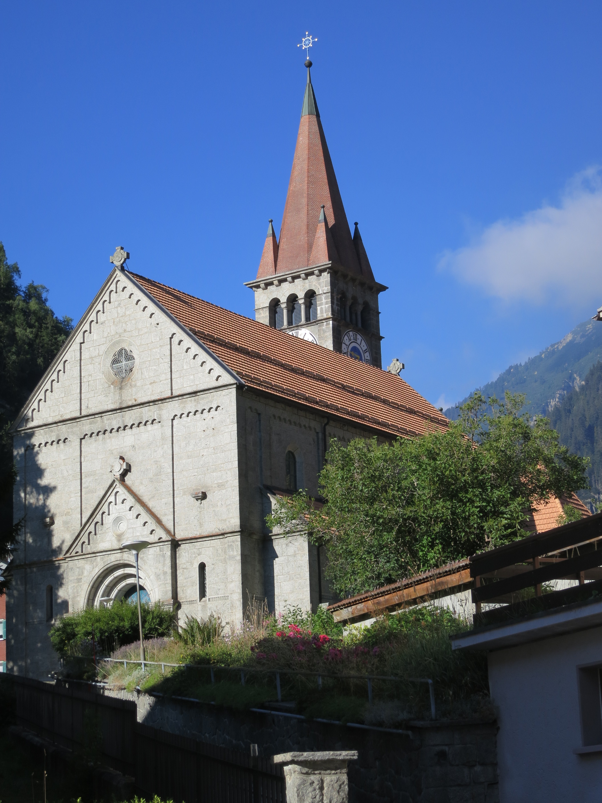 Katholische Kirche Maria Himmelfahrt, Göschenen UR, Schweiz